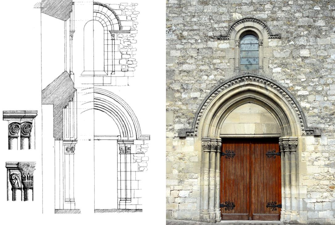 Transformation néoromane de la façade - relevés effectués par Eugène Woillez pendant les années 1840 (à gauche, source : Eugène Joseph Woillez, Archéologie des monuments religieux de l'ancien Beauvoisis pendant la métamorphose romane, Paris, Derache, 1849, 492 p., Fitz-James, planche III) et photo de la situation en 2015.